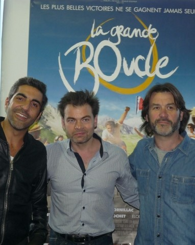 Soritie du Film ' La Grande Boucle '